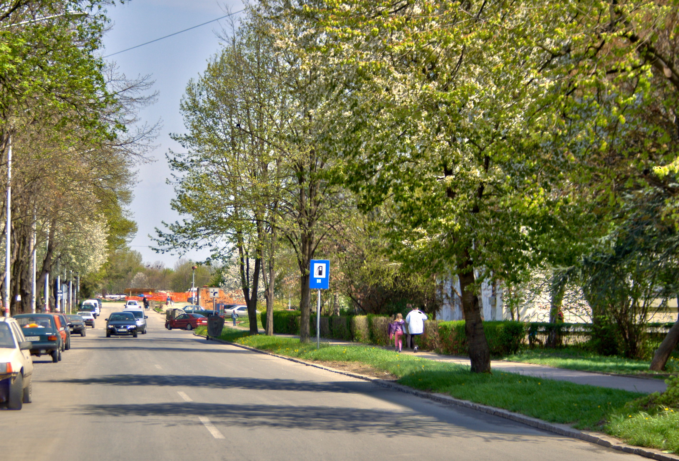 Улица Бертранда Расела, Земун Поље